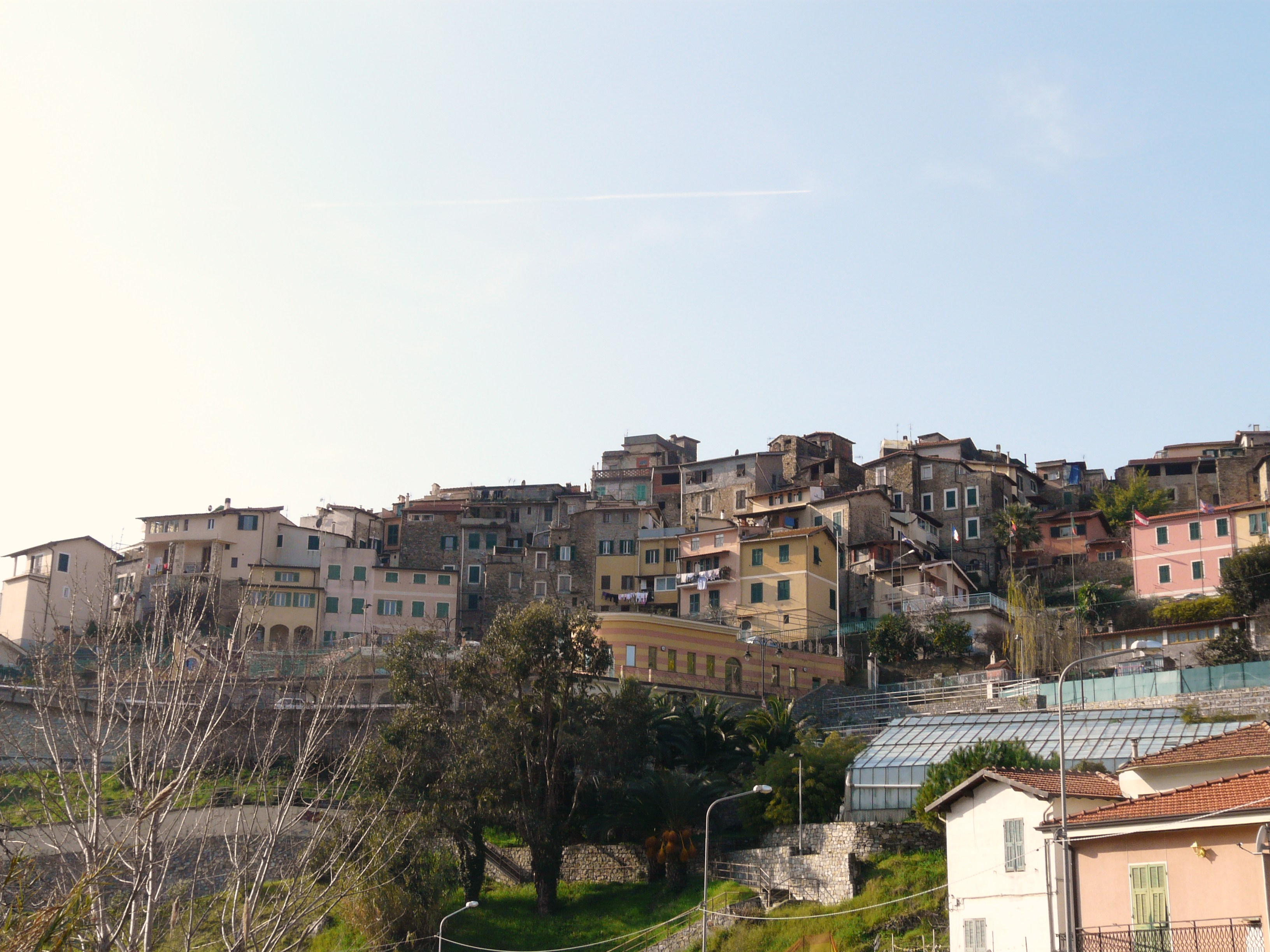 San Biagio della Cima, Liguria, Italia